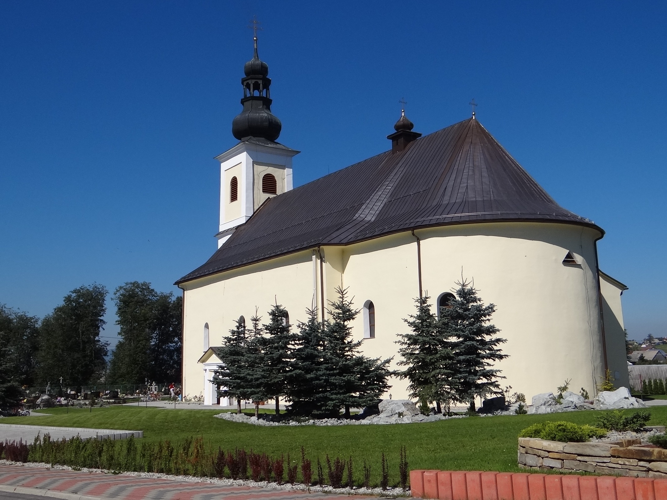 Čimhová (kościół w miejscowości Czymchowa)